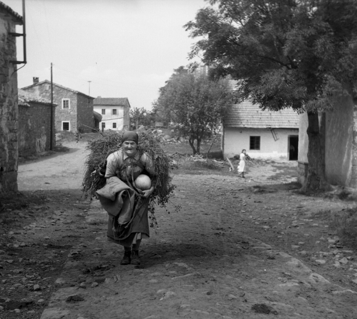 Žena iz Podbeža, krma za prašiče.